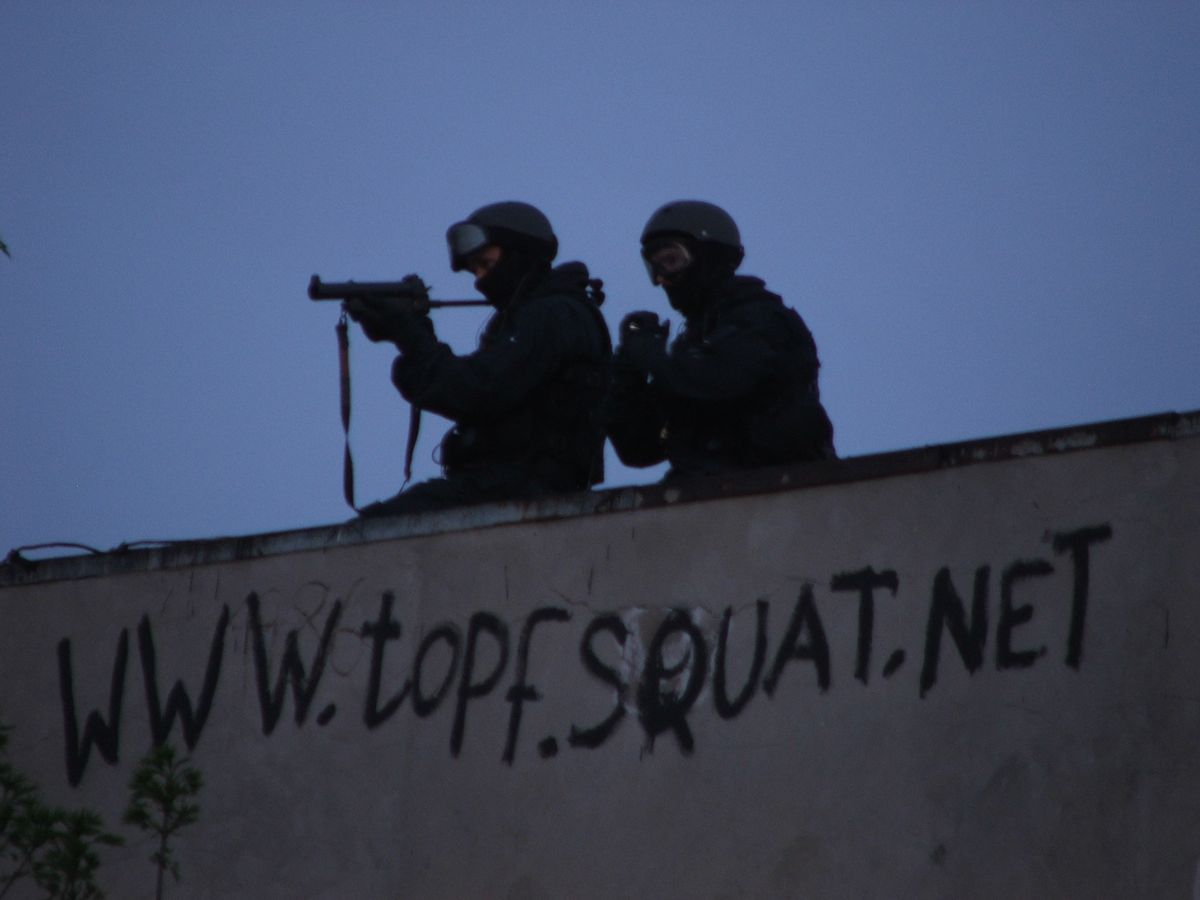 Räumung des Besetzten Hauses in Erfurt am 16.4.09 . Viele Bilder sind Unscharf, da es noch sehr dunkel war & es sehr hektisch war. Sie stehen natürlich unter der CC-Lizenz.